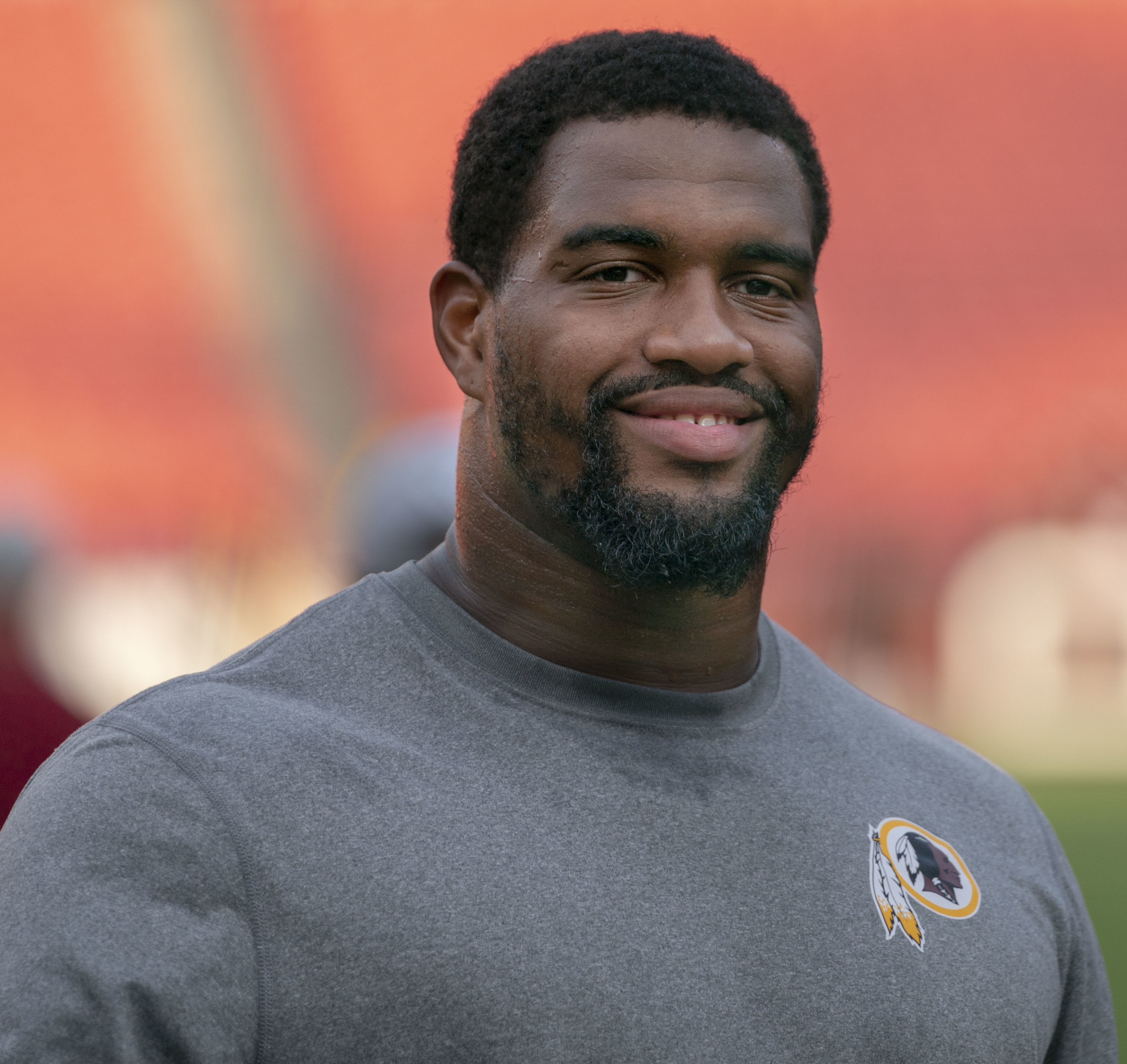 Jets at Redskins 8/16/18